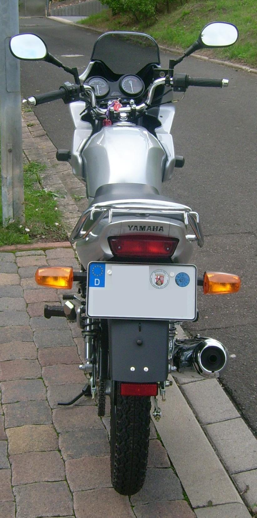 YBR 125 Diversion von Hinten